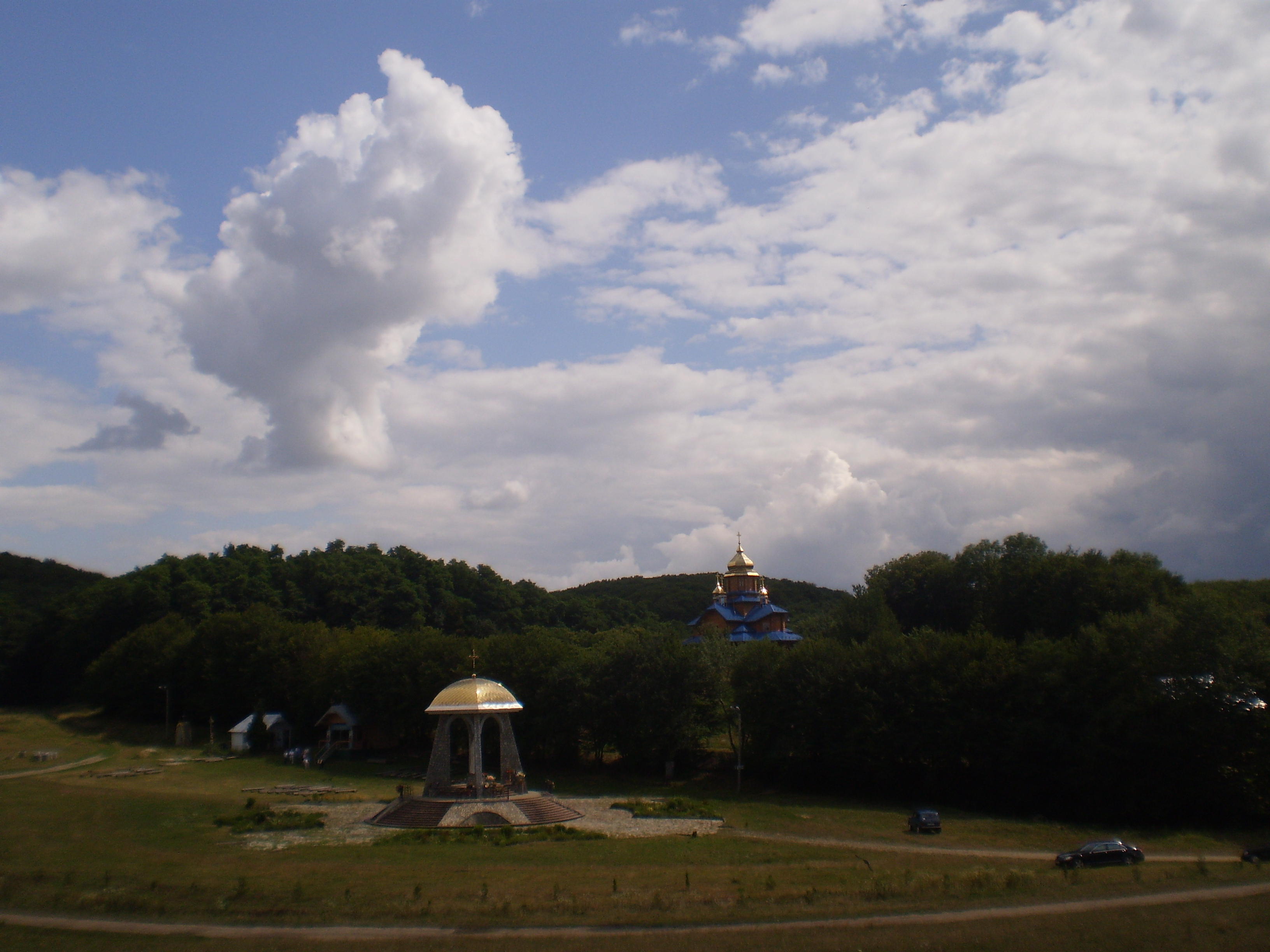 Церква Успіння Пресвятої Богородиці (дер.), Погінський монастир Успіння Матері Божої, с. Погоня